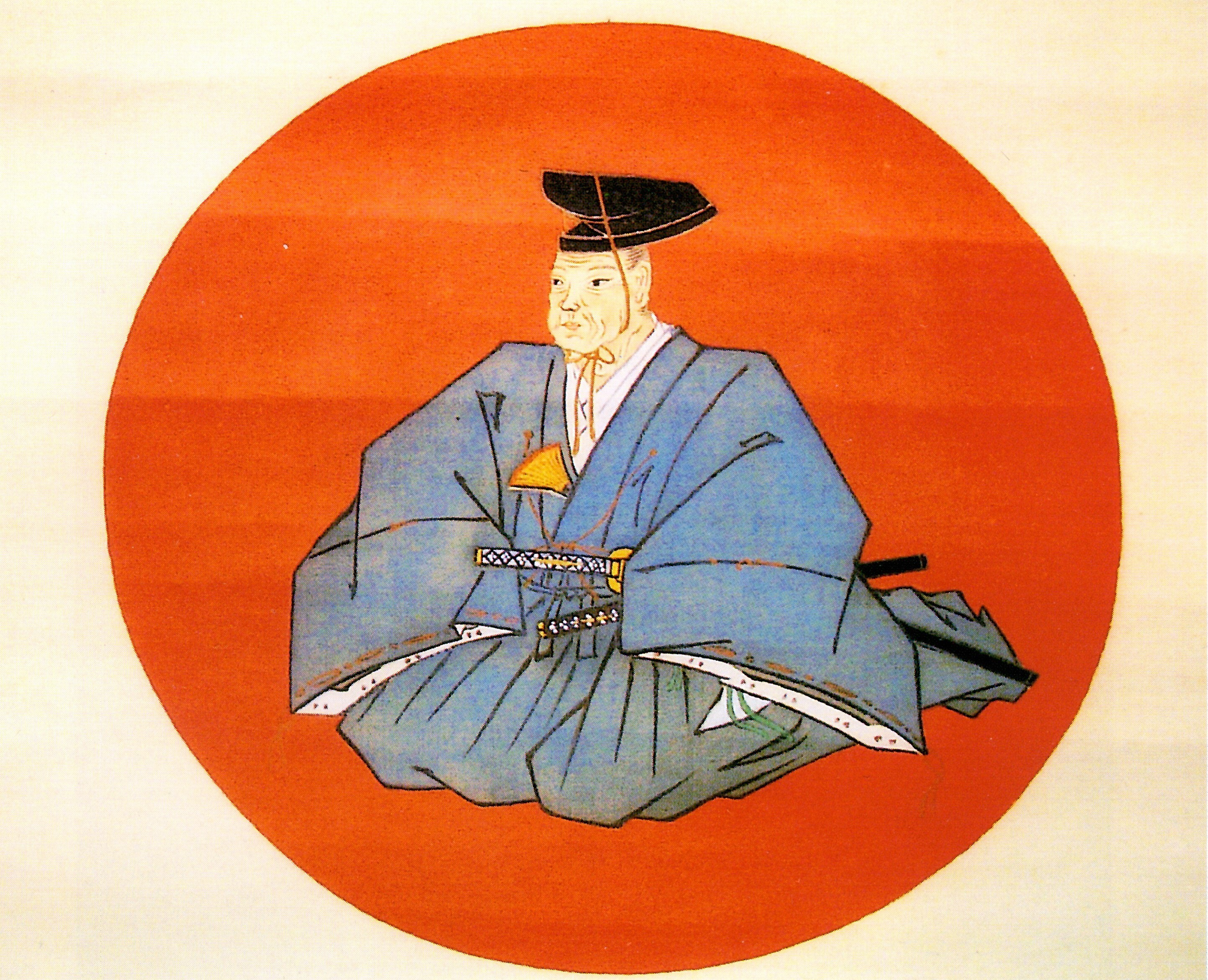 松平輝貞の官服姿の肖像。